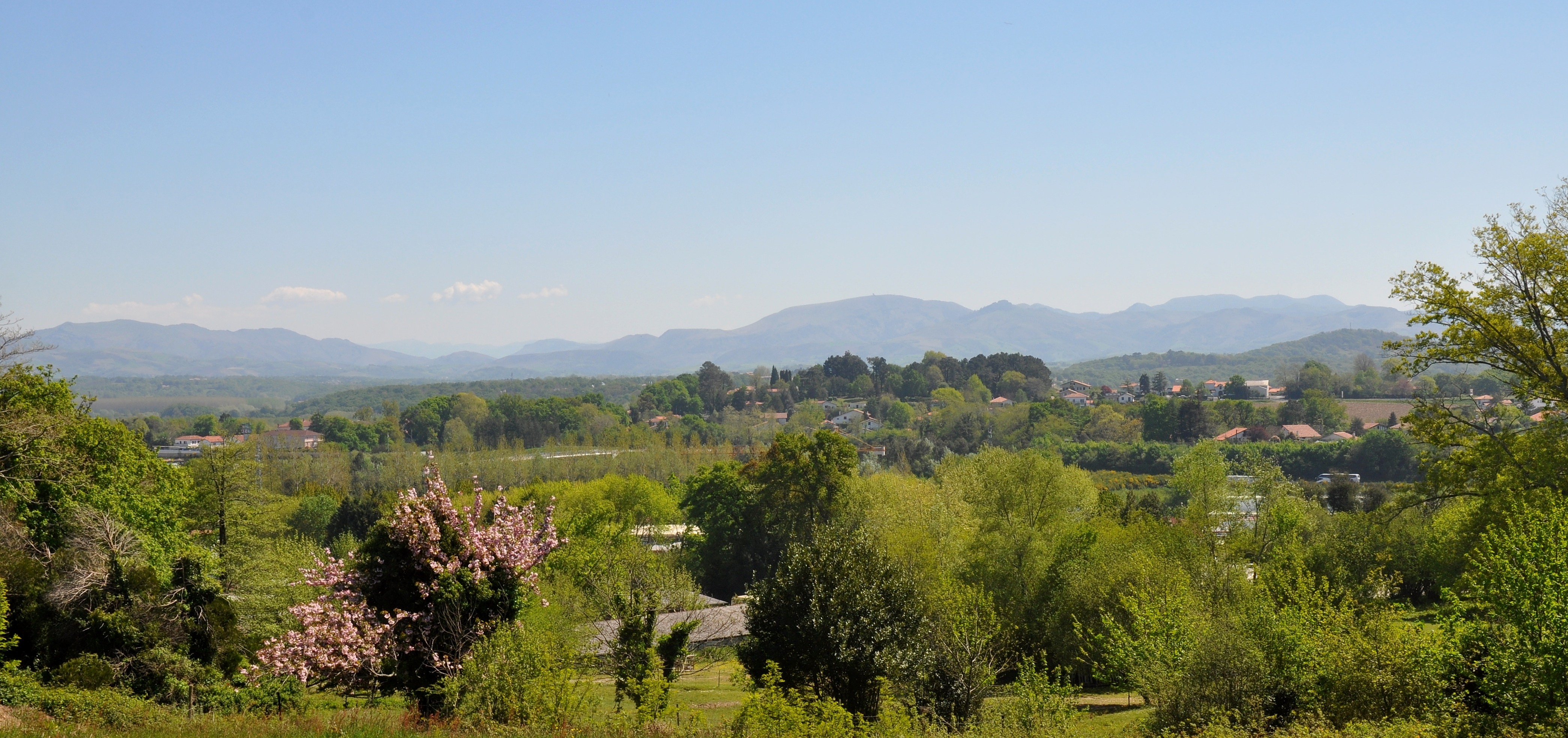 ANGLET - VUE DEPUIS HAUTEUR DE BRINDOS